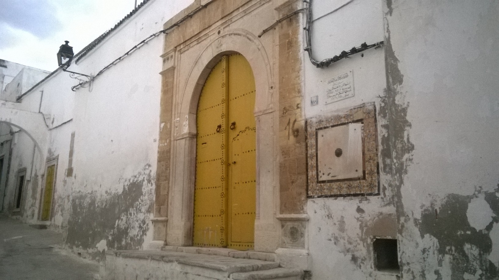 La médina de Tunis مدينة تونس العتيقة